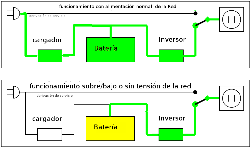 SAI Doble Conversión o Delta